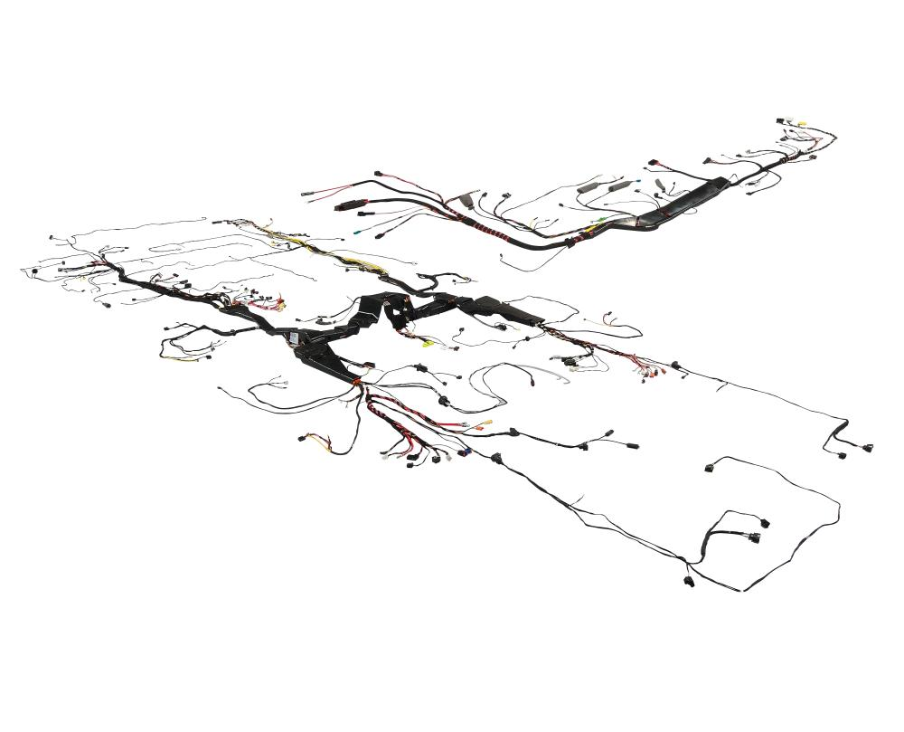 2004 Kabelbaum Dräxlmaier Group